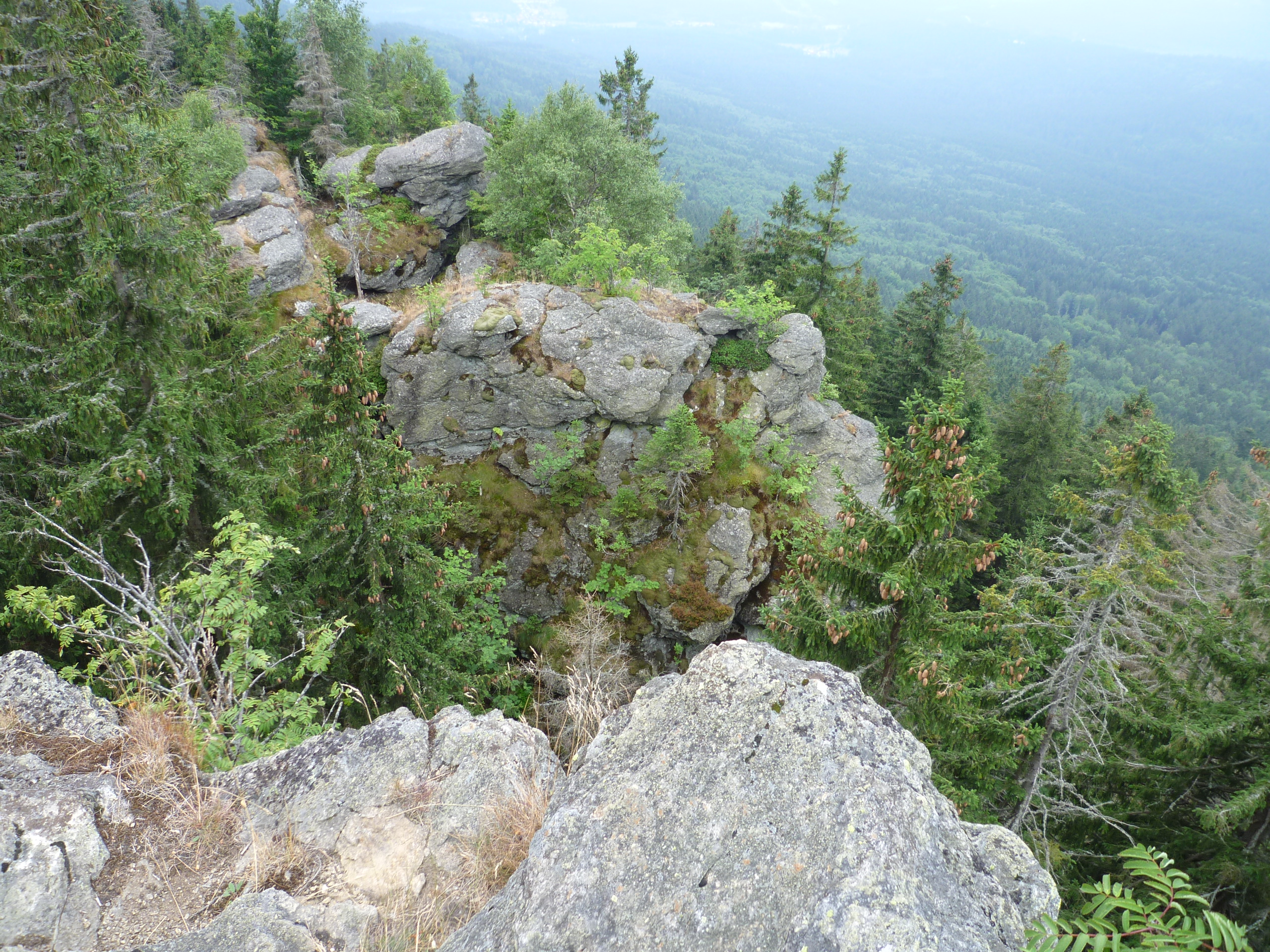 Gipfelklippen des Kleinen Falkenstein. Der Kleine Falkenstein gehört zu den Geotopen im Landkreis Regen mit der Kennung 276R021. Der Kleine Falkenstein liegt im Nationalpark Bayerischer Wald.